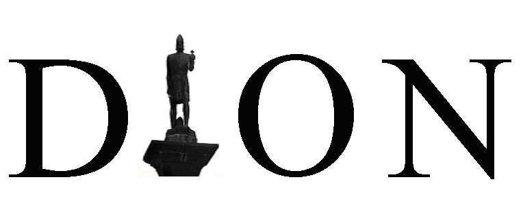 Logoen til interesseorganisasjonen DION